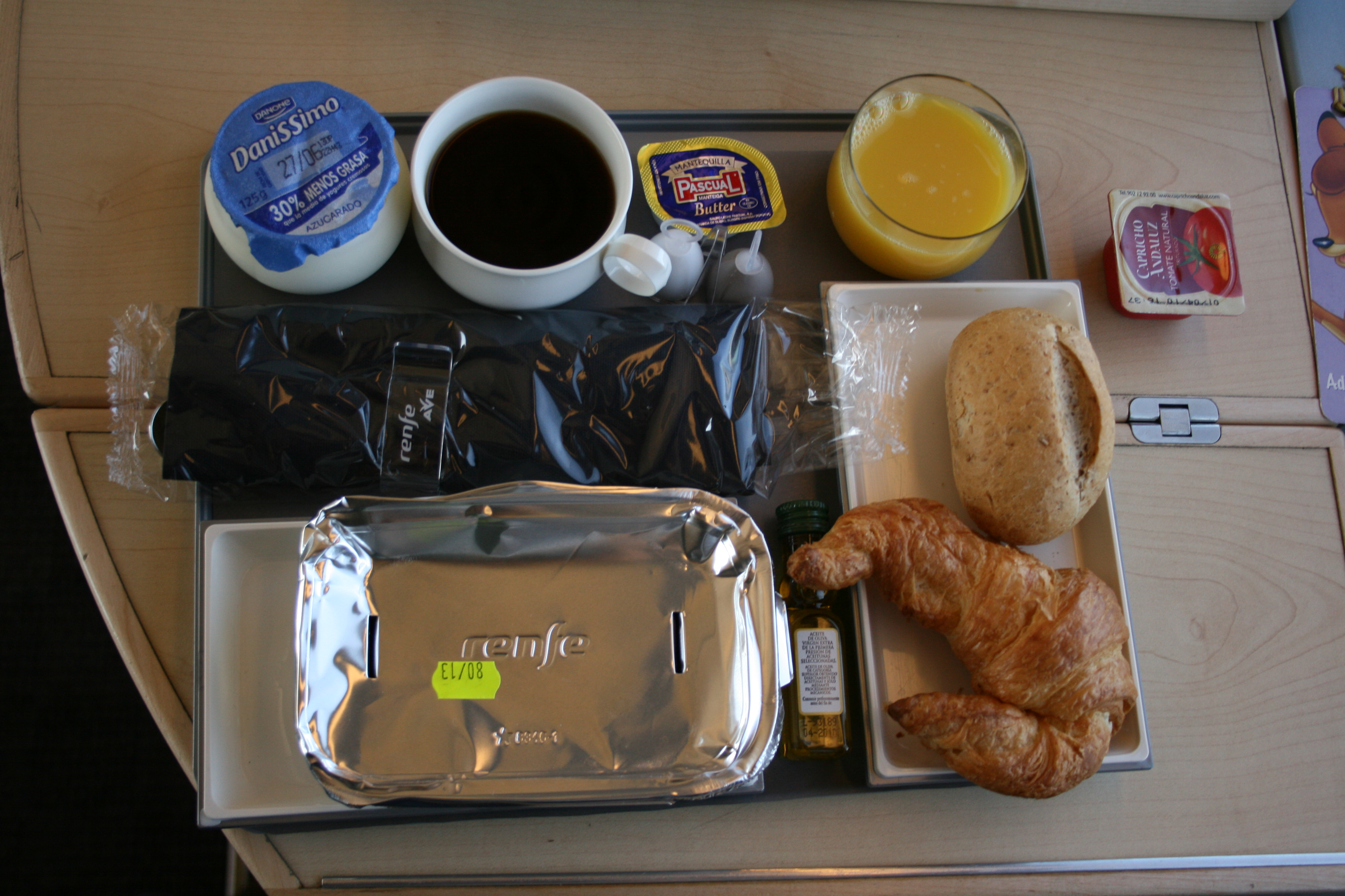 Desayuno en un tren AVE español (Preferente) - Yogurt- Café - Mantequilla - Zumo de naranja - Salsa de tomate (fuera de bandeja) - Cubertería (negro)- pan integral y croisant (bandeja vertical) y plato caliente